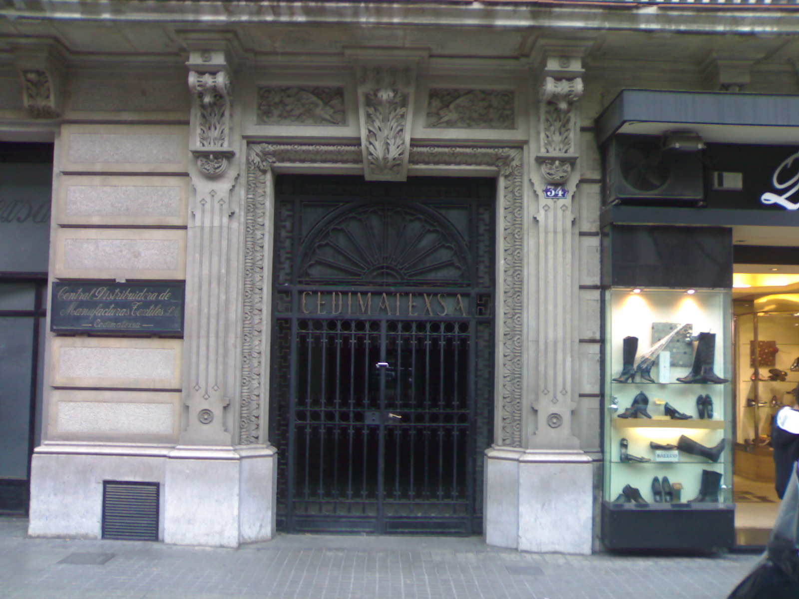 Rambla de Catalunya, 34, Barcelona, Catalunya, Spain; January 2008